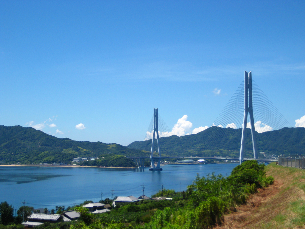 しまなみ海道 多々羅橋 Shimanami Kaidou Tatarahashi